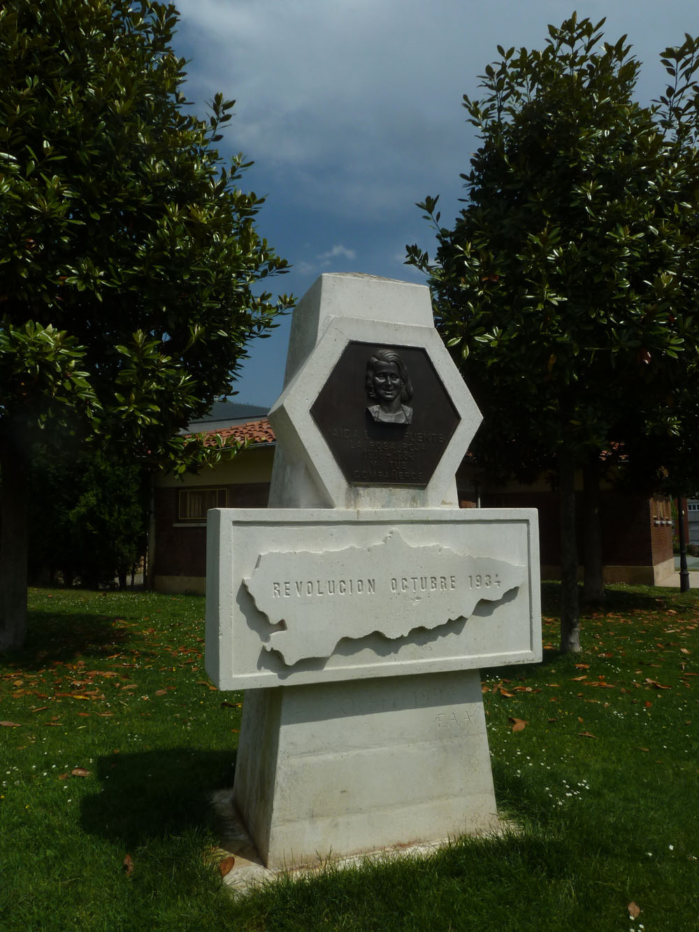 La Rosa Roja (1918-1934) y tus compañeros.